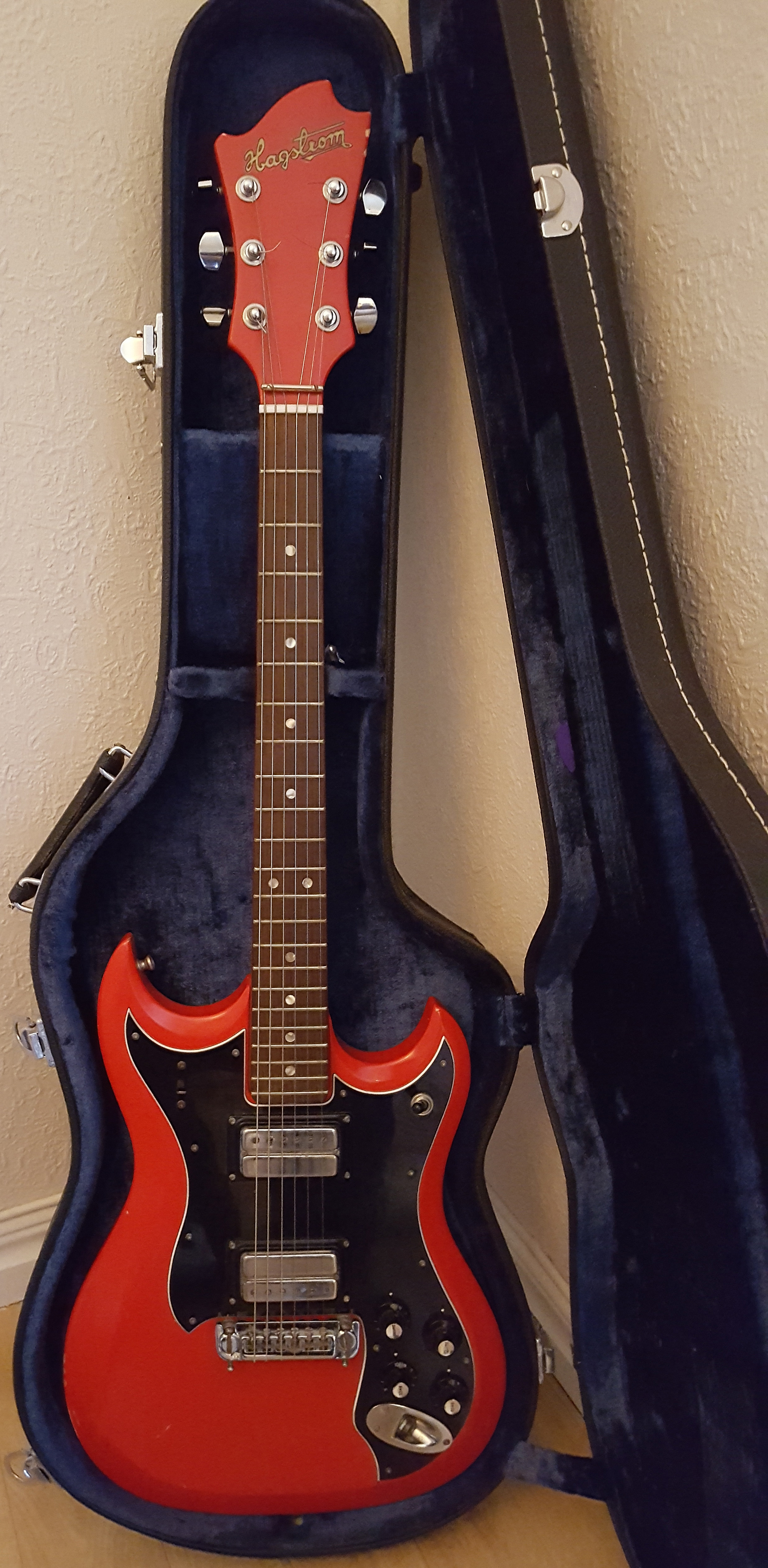 Vintage Guitar 1979 Hagström Partner, red Serial # 53 0631 45, with red neck. In original Hagström hard case.